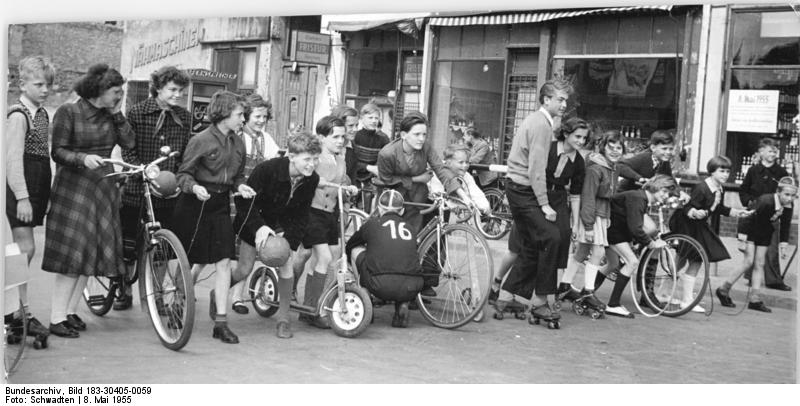 Zentralbild Schwadten 8.5.1955 Berlin feiert den 8. Mai, den 10. Jahrestag der Befreiung vom Faschismus. Am Nachmittag des 8. Mai 1955 fanden nach der grossen Kundgebung auf dem Marx-Engels-Platz überall in den einzelnen Stadtbezirken Volksfeste statt, so daß dieser bedeutungsvolle Tag für alle Berliner in Freude und Frohsinn ausklang. UBz: Im Stadtbezirk Berlin Weissensee starteten die Jungen Pioniere zur Friedensstaffette ins Ferienlager 1955". - Die jungen Pioniere am Start auf dem Antonplatz.